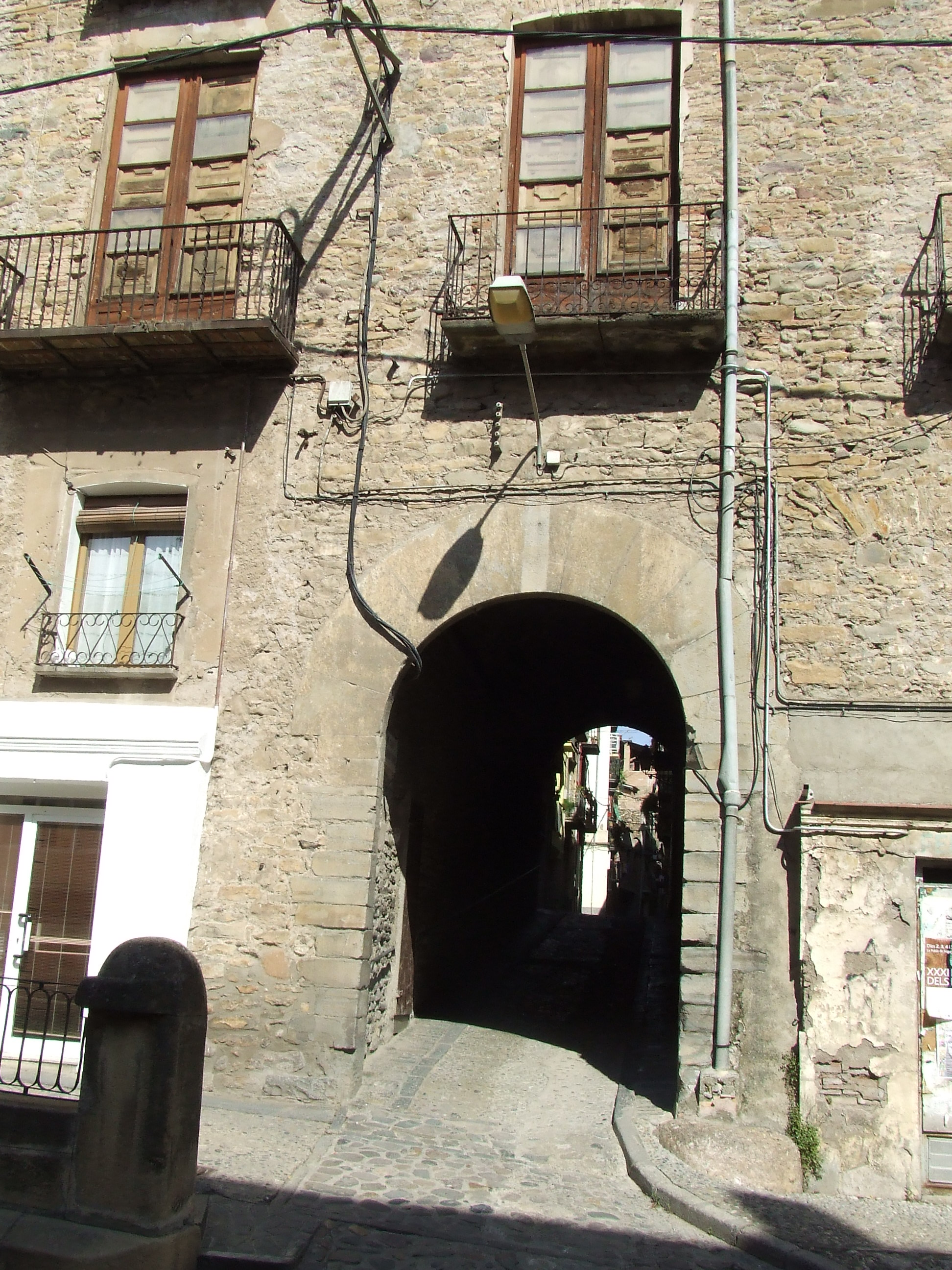 Portal d'Orteu, de la Pobla de Segur (Pallars Jussà)